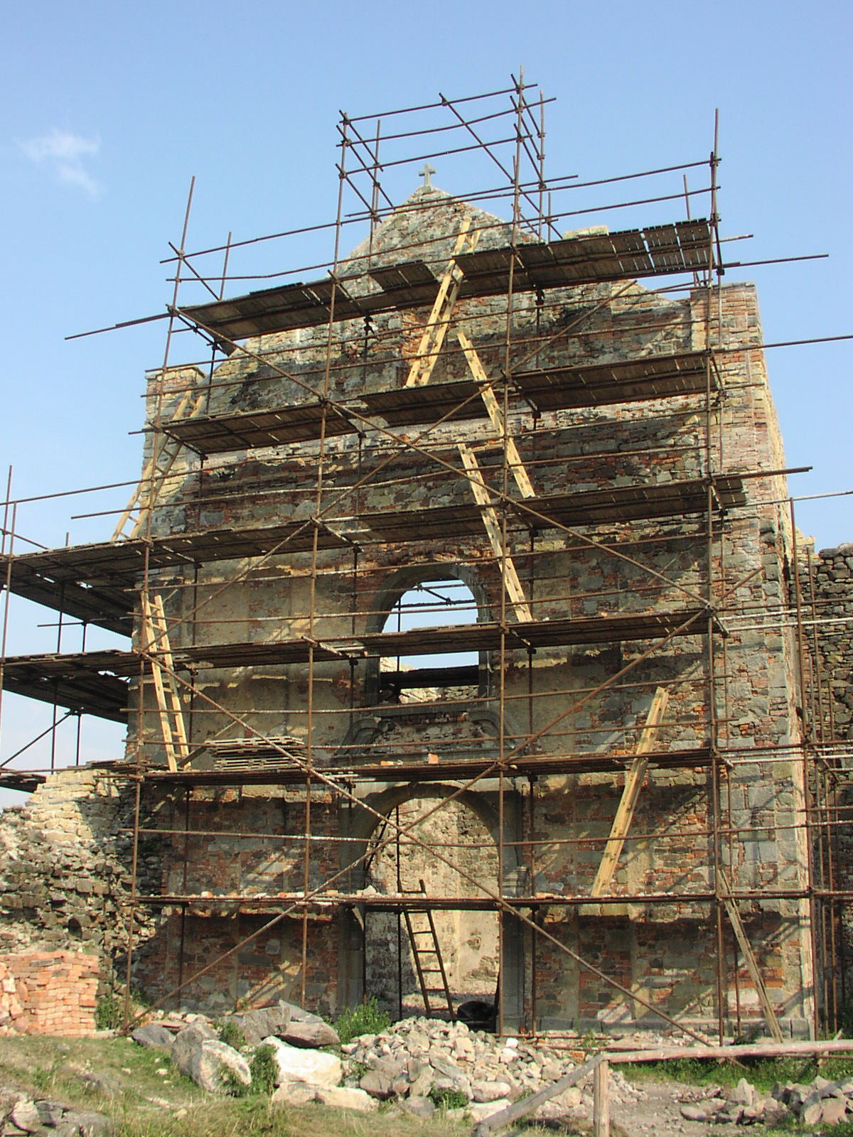 Česky: Oprava hradní kaple, 2003